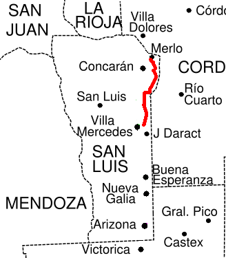 Mapa del recorrido aproximado de la Ruta Provincial 1 de San Luis